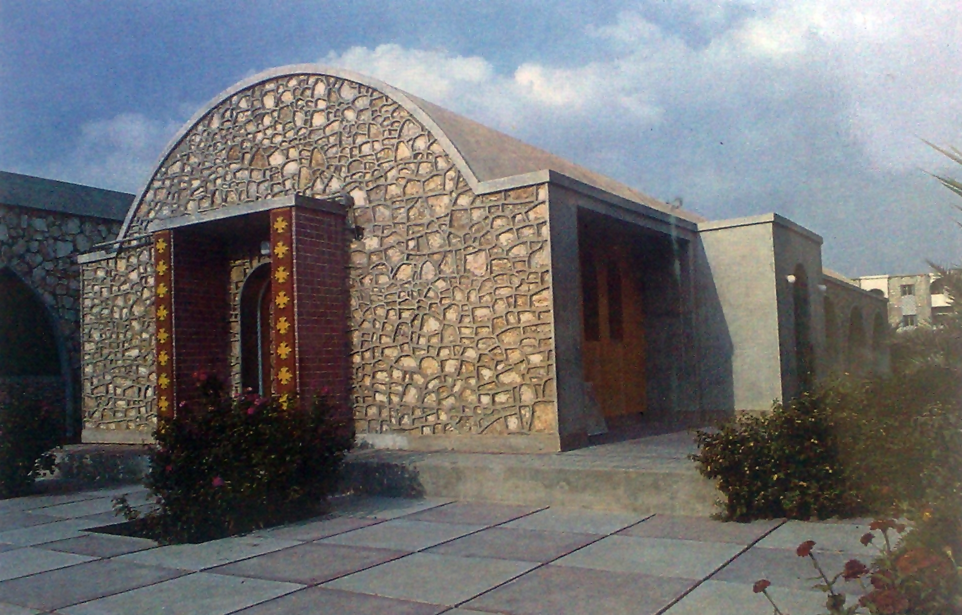 مائدة الرهبان بدير الأنبا مقار